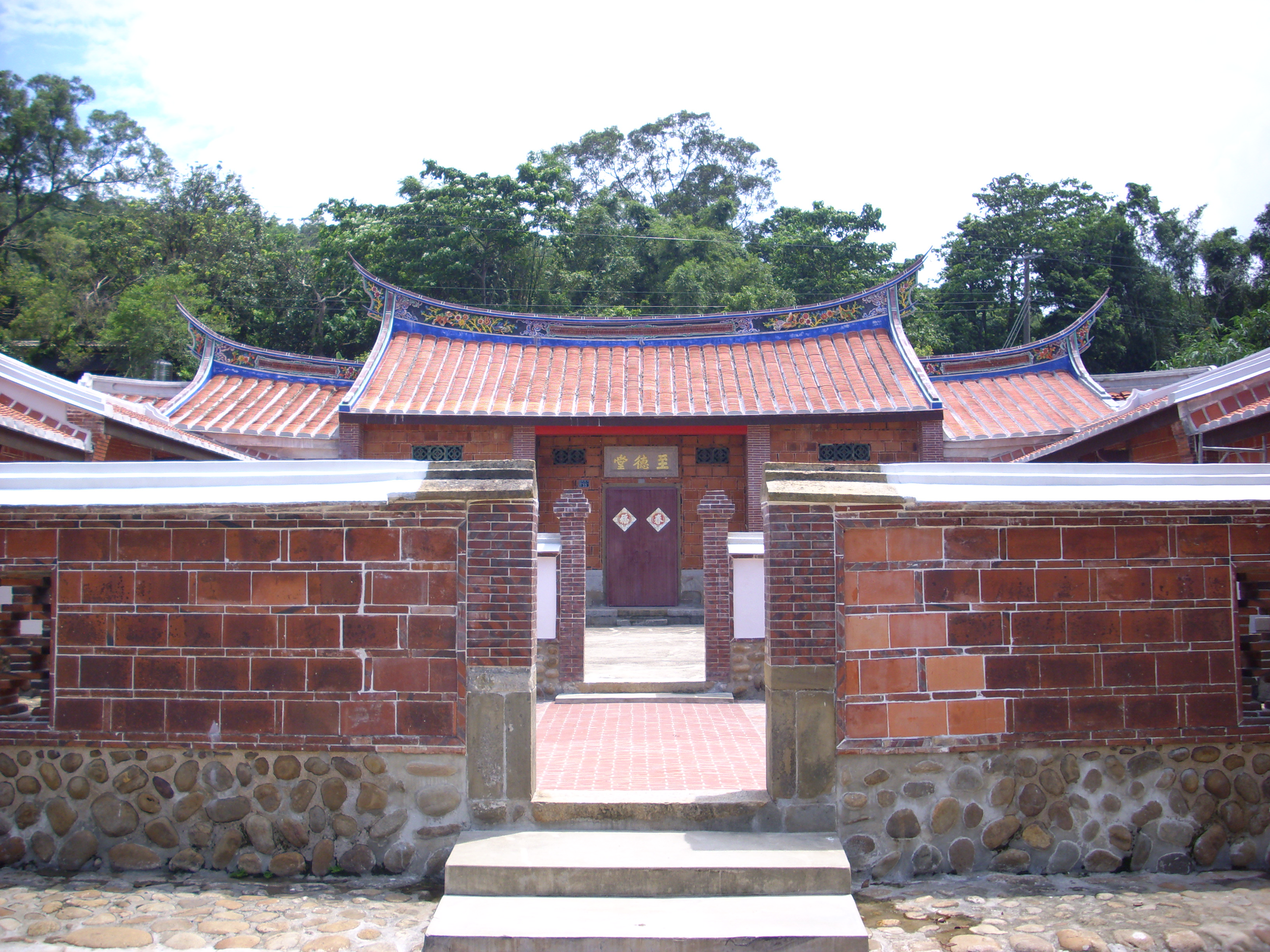 新埔吳濁流故居